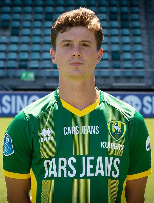 Bas Kuipers